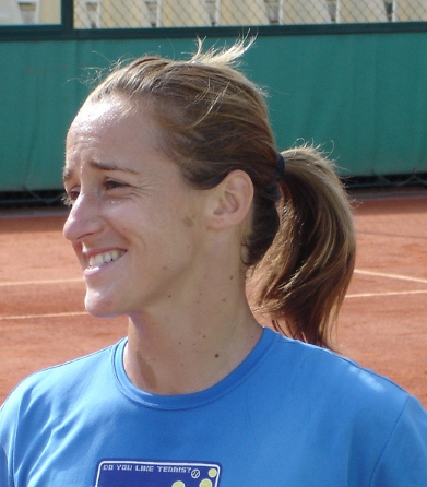 Magdalena Maleeva après un entrainement à Roland-Garros en 2005